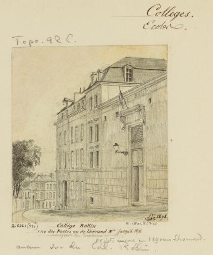 Collège Rollin rue des Postes vers 1860-1870